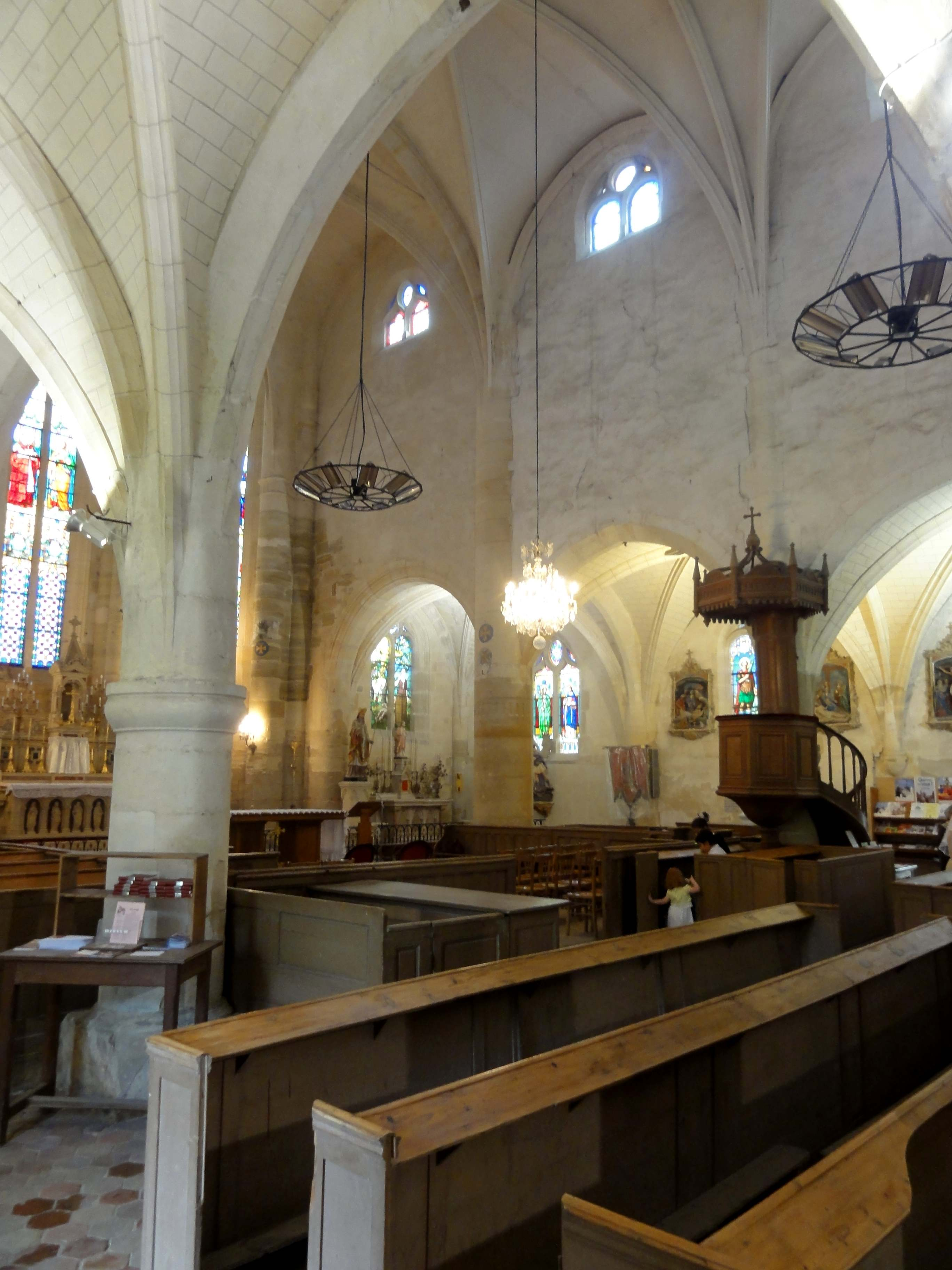 Intérieur de l'église - voir titre.